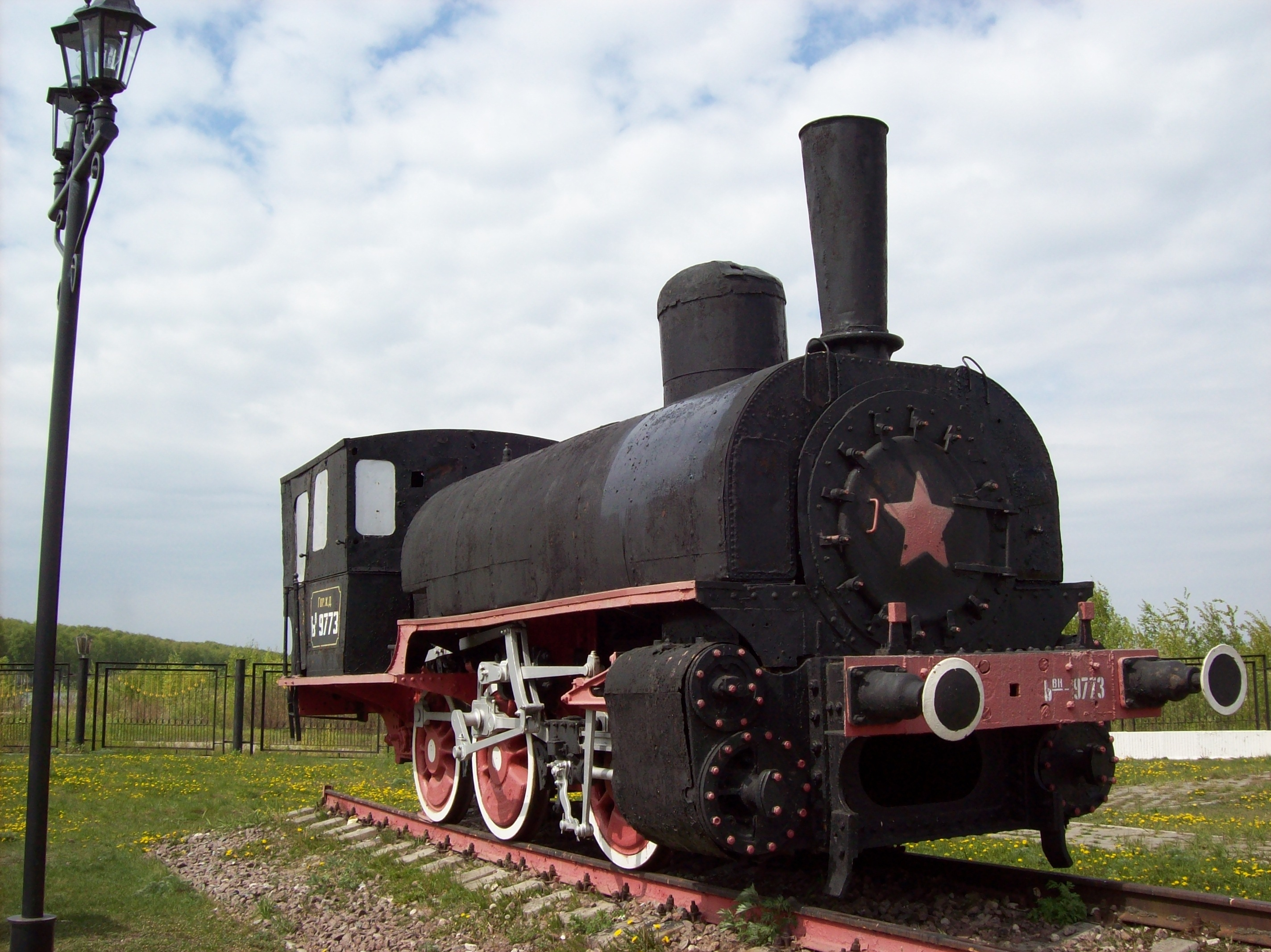 Lokomotive ЬВН (Паровоз ЬВН)